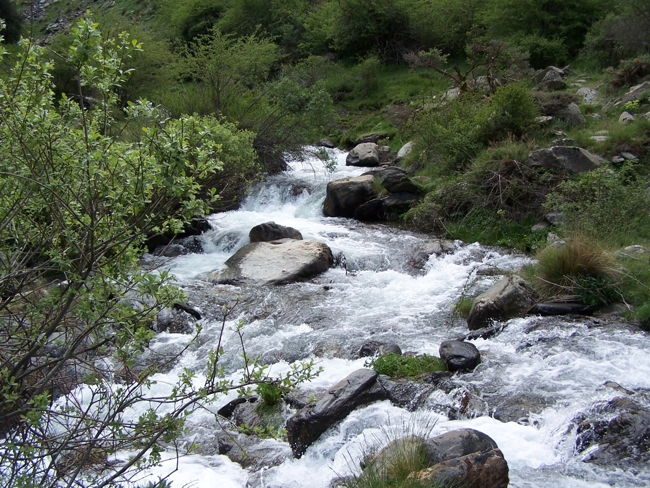 El río Genil a poca distancia de su cabecera, en la provincia de Granada (España)